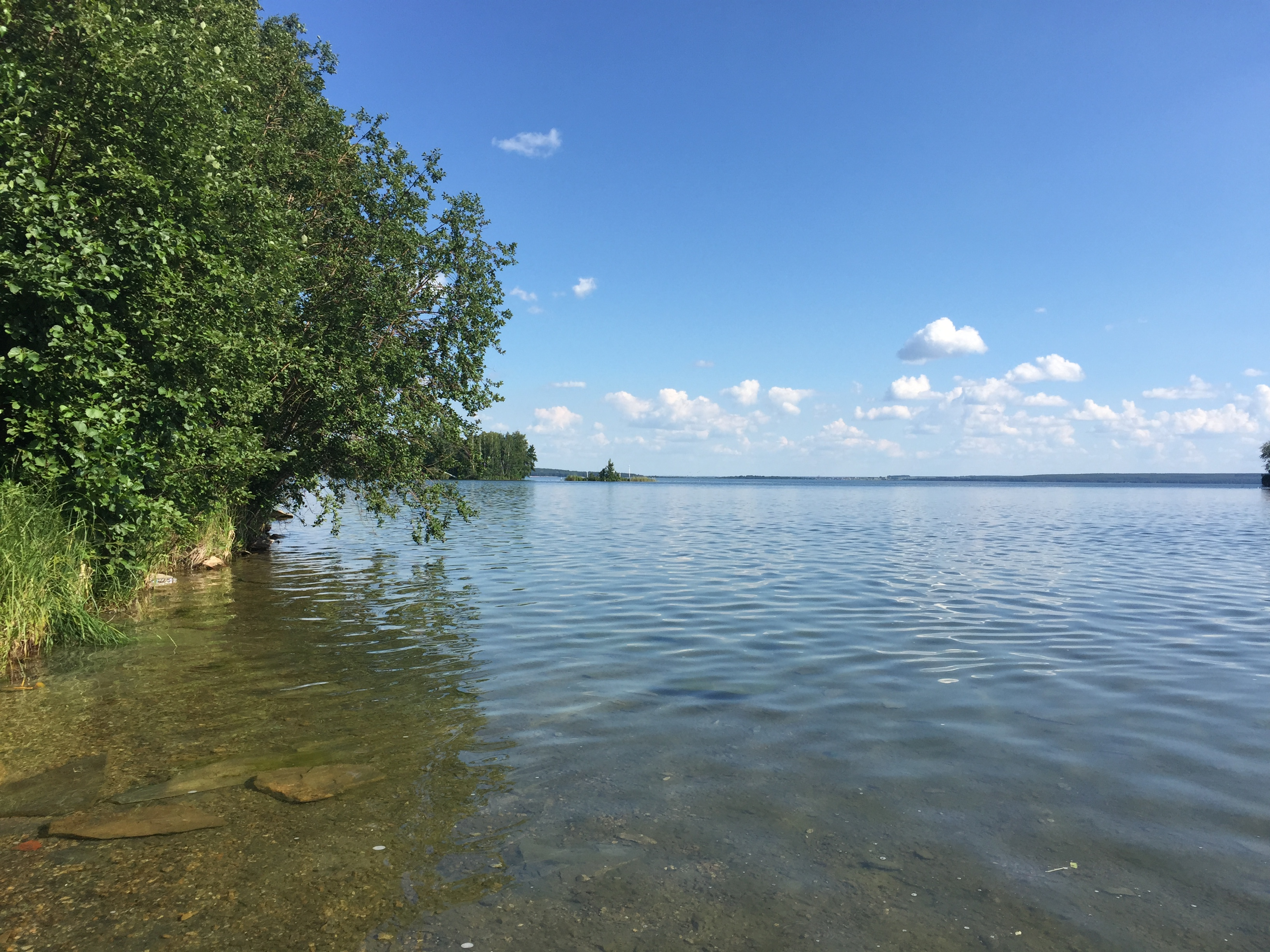 Озеро Увильды: Памятник природы расположен в области предгорий восточного склона Уральских гор в пределах границ Аргаяшского муниципального района, Карабашского и Кыштымского городских округов, Аргаяшский район, Челябинская область This image is related to the protected area of Russia number 7410018